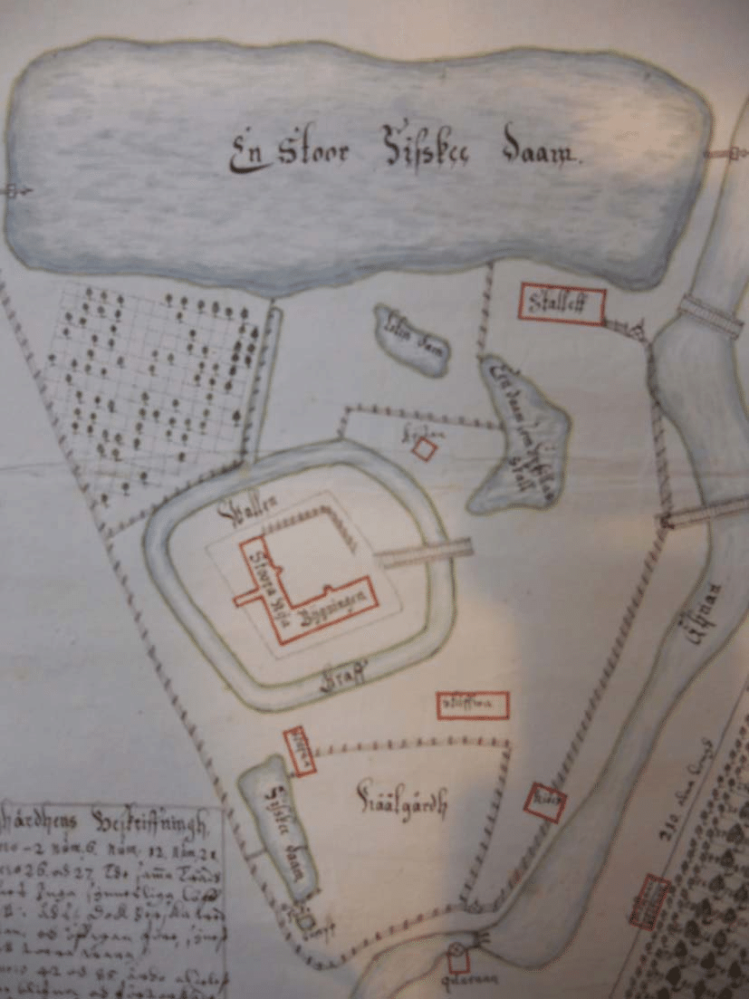 Rootsi feldmarssali G. K. Horni koostatud koostatud Vainiži linnuse ja mõisa plaan aastatest 1649–1654. Ülessesuunda jääb lääneedela ilmakaar.